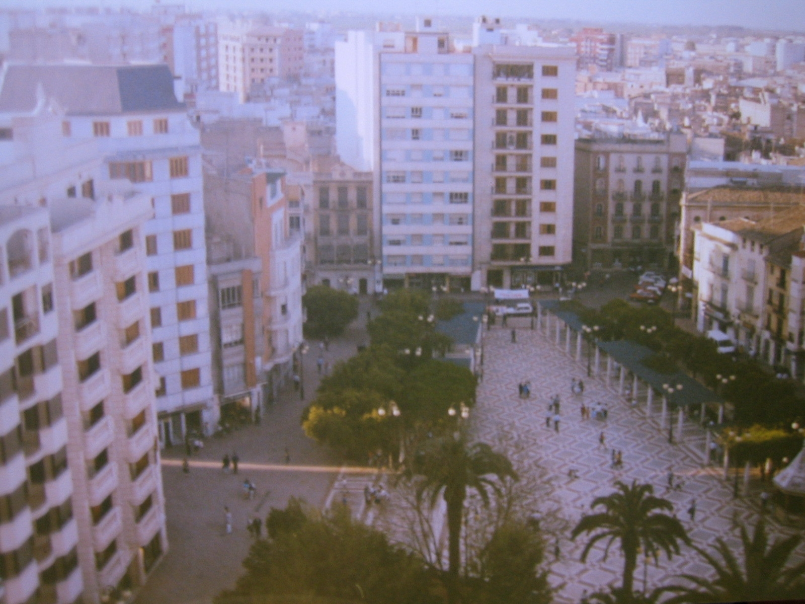 Panorámica de la plaza Mayor de Alzira.